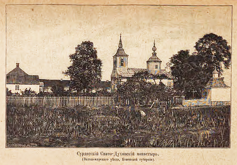 Сурдегский Свято-Духов монастырь